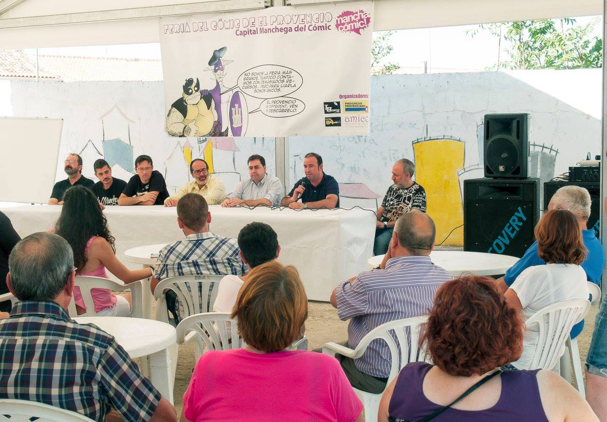 Inaguración VII Feria Cómic